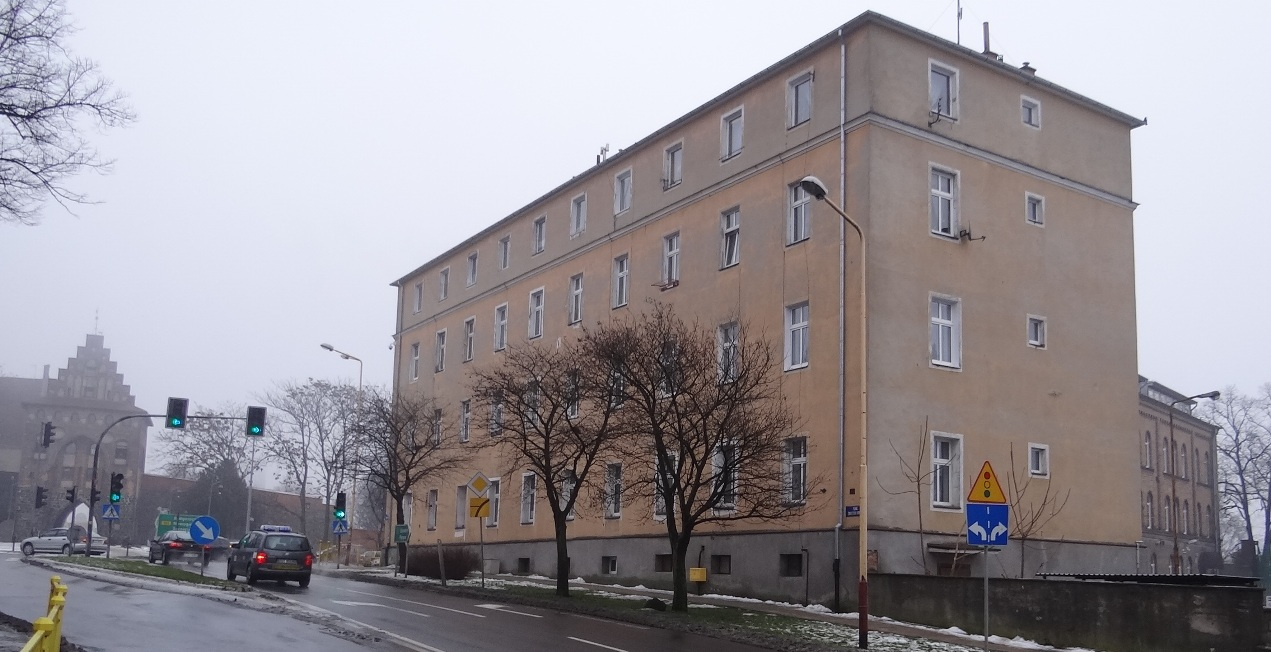 Garnizon Stargard, 1914 r. Były budynek Dowództwa Podokręgu i Garnizonu, obecnie budynek mieszkalny przy pl. Świętego Ducha